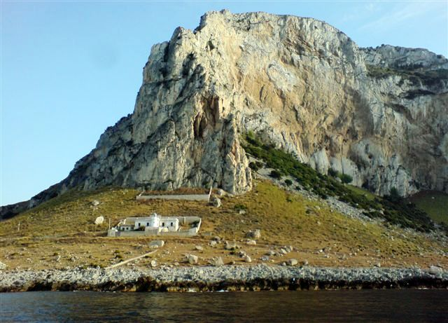 Riserva naturale Capo Gallo, Palermo, Sicily Il faro di Capo Gallo